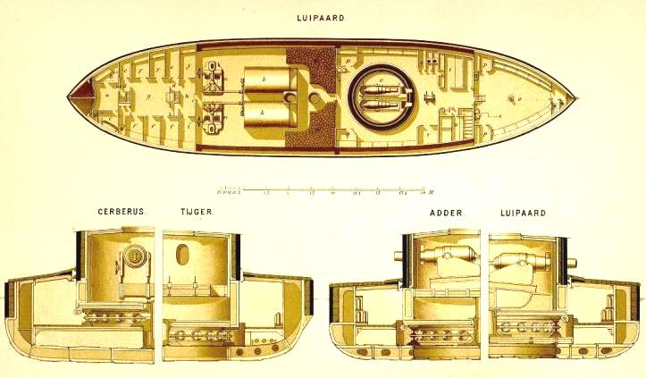 Doorsnede van een aantal monitors